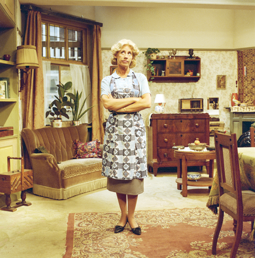 Joke Bruijs op de set van Toen was geluk heel gewoon in 1993